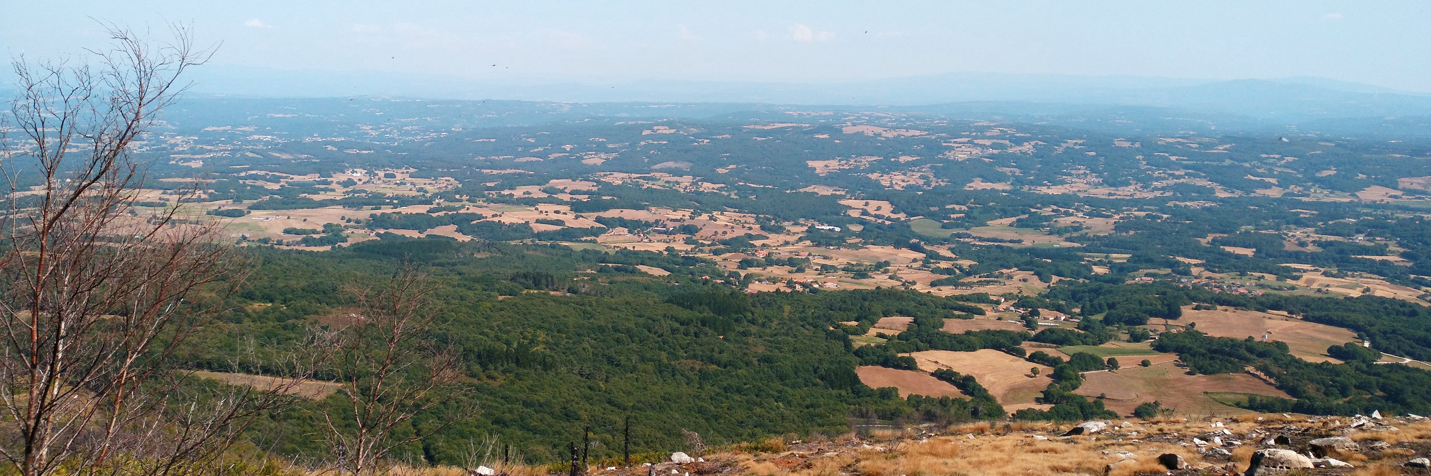 Vista desde a Serra do Faro (Chantada)